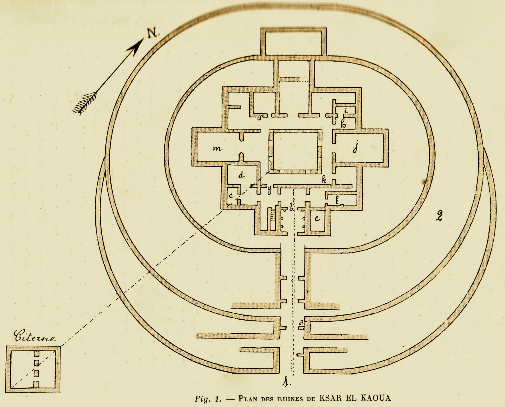 Plan du château romain Ksar el Koua de Ammi Moussa. IIIe siècle ap. J.-C. (province antique de la Mauritanie Césarienne) correspondant au territoire ouest de l'Algérie actuelle.